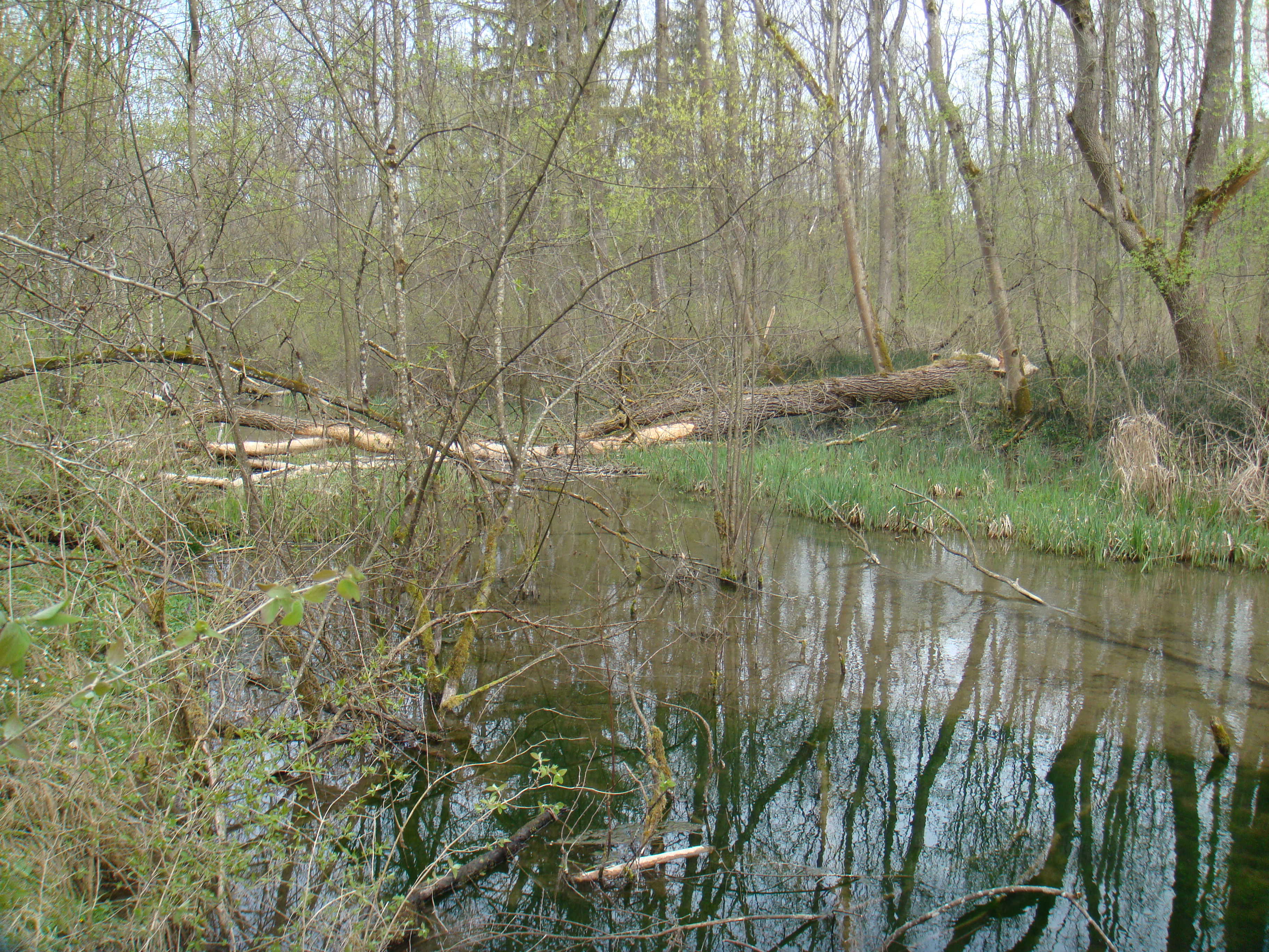 Illerauwald bei Au